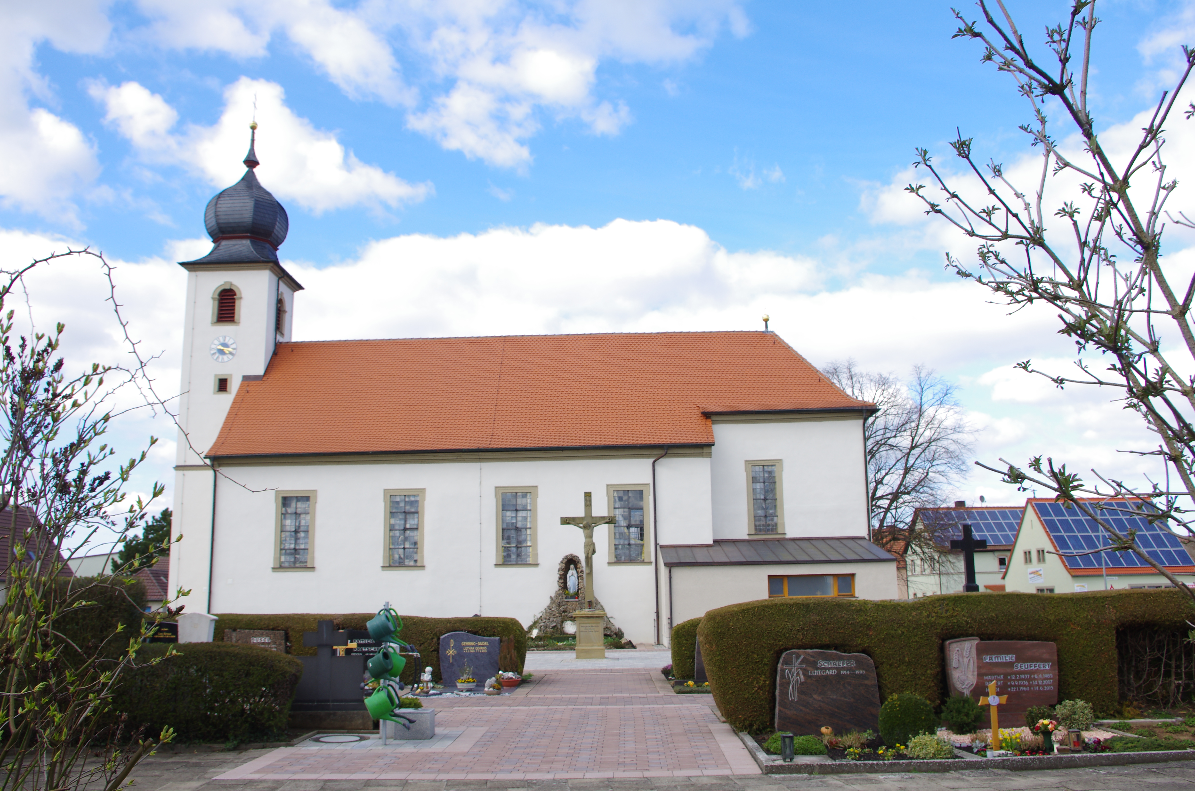 Bartholomäus, Bartholomäusplatz, Oberspiesheim, Gemeinde Kolizheim, Unterfranken, Deut schland